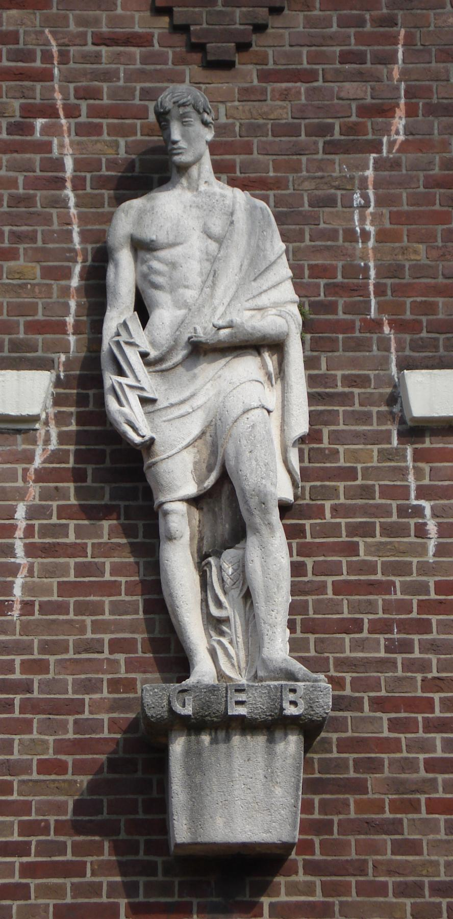 Den Haag, Diepenburchstraat. Kunstwerk "Personificatie van de electriciteit" van Dirk Bus. The Netherlands. FOP